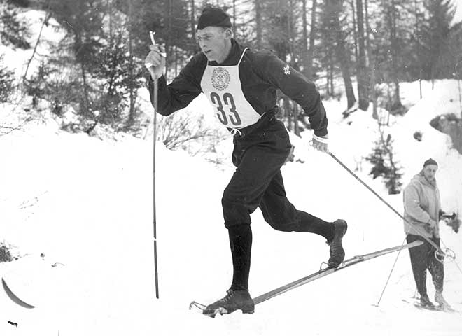 SVERRE STENERSEN: Vant kombinertkonkurransen i Cortina i 1956.